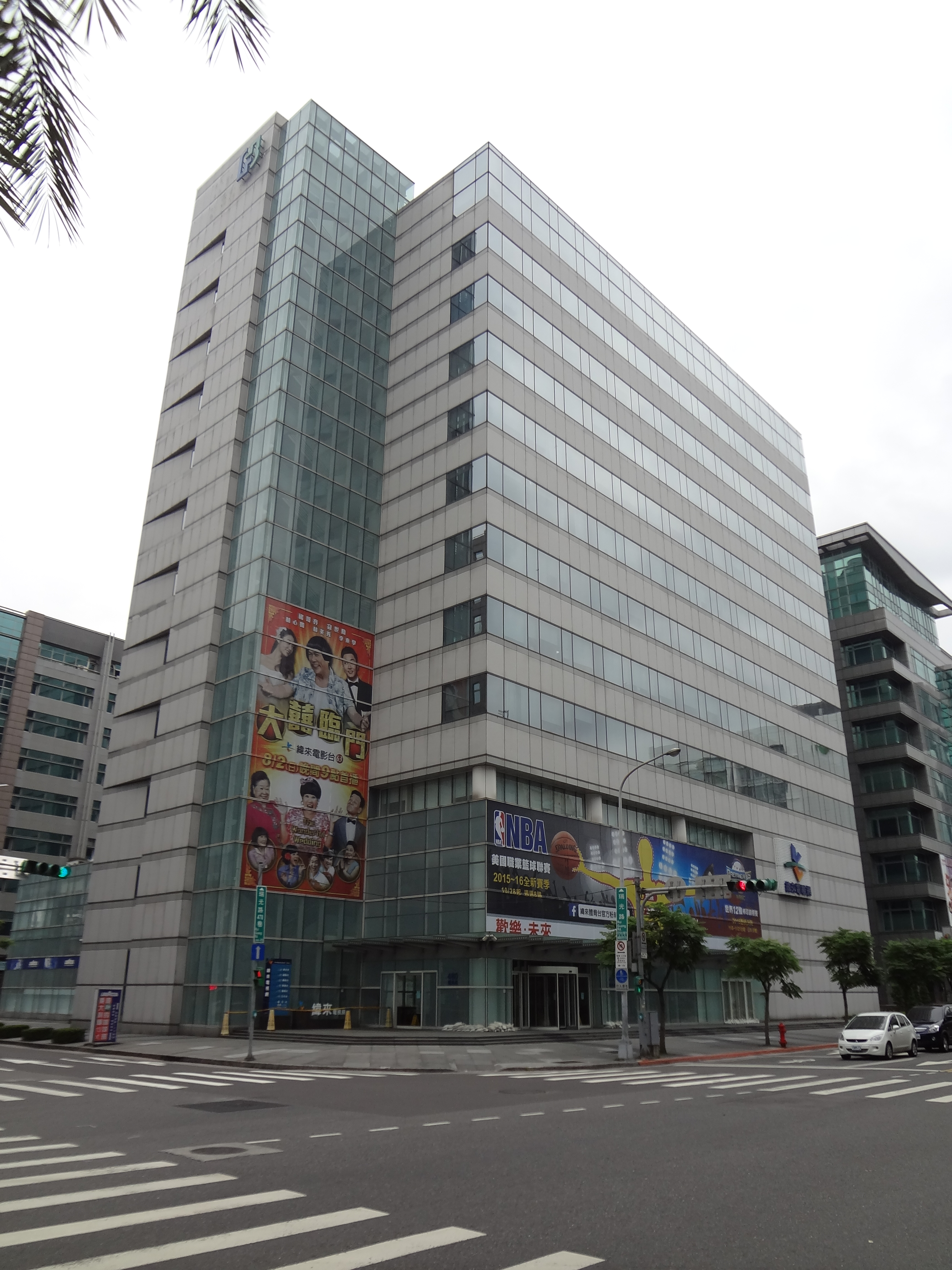 富邦人壽瑞光大樓，是緯來電視網總部與立達國際總部所在地。